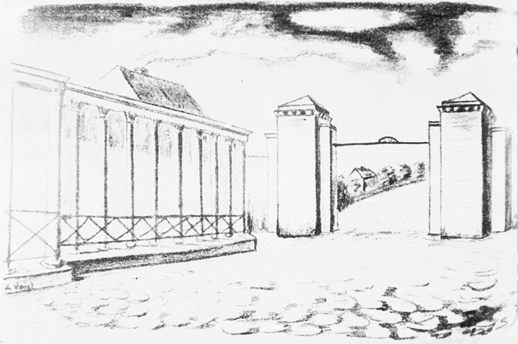 Das Königstor. Zeichnung aus dem Jahre 1809, reproduziert 1930 in Walter Gensch' Buch Der Berliner Osten. Original-Metadaten: Landesdenkmalamt Berlin, Microfiche-Scan mi03490d04; A. Voigt (1809) Zeichnung, Zeichenkunst Ort unbekannt Metadaten aus Bild (Transskription): „LKB 7396 D Berlin, Königstor (Bernauer Tor), 1809. Zeichnung von A. Voigt (Repro 1950 aus: Gensch, Berliner Osten 1930,S. 104)“